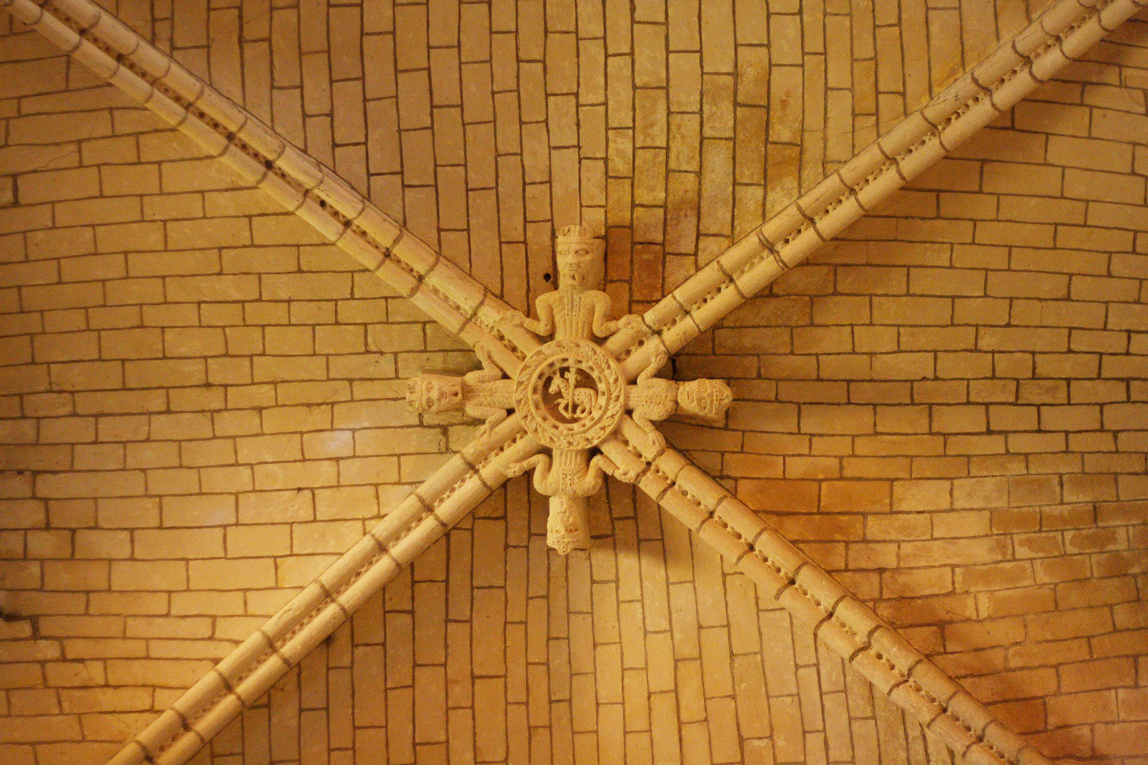 katholische Pfarrkirche Saint-Sulpice in Chars, Sclussstein